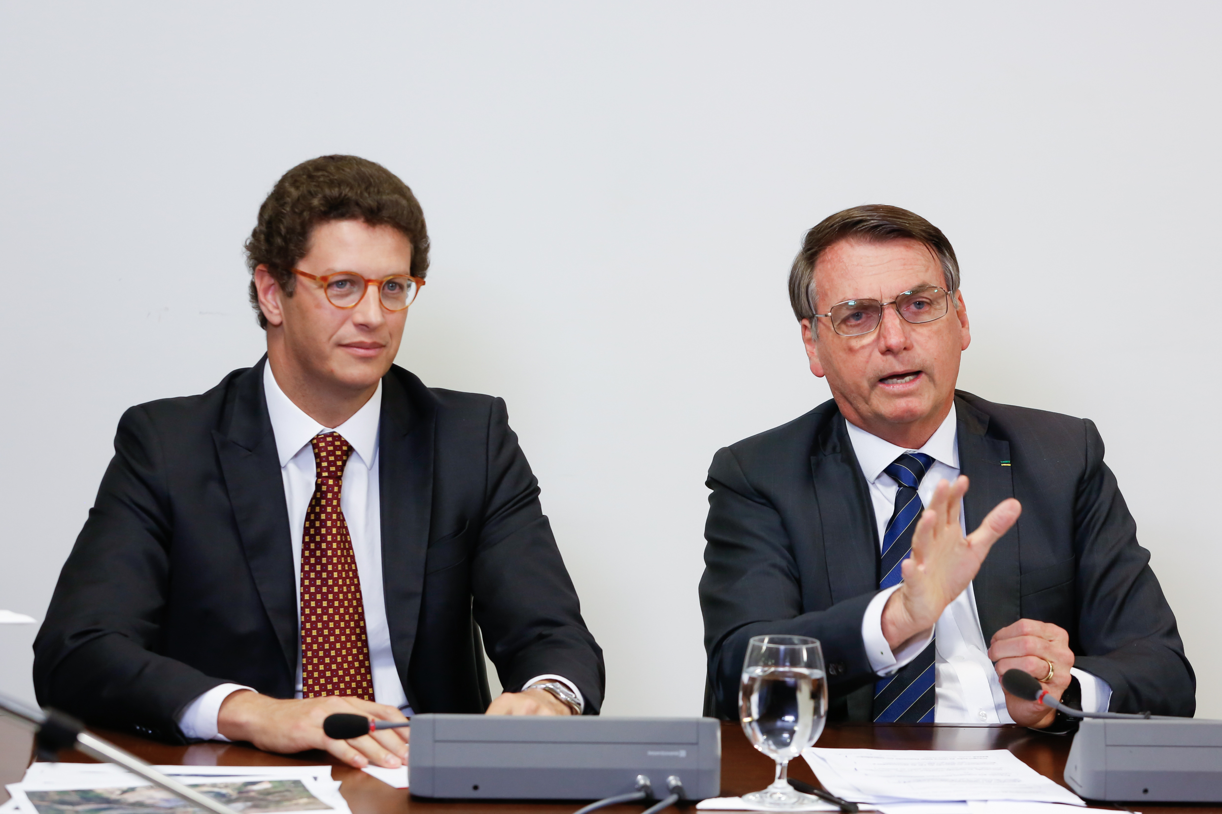 (Brasília - DF, 08/08/2019) Presidente da República, Jair Bolsonaro durante transmissão de Live para redes sociais. Fotos\: Carolina Antunes/PR